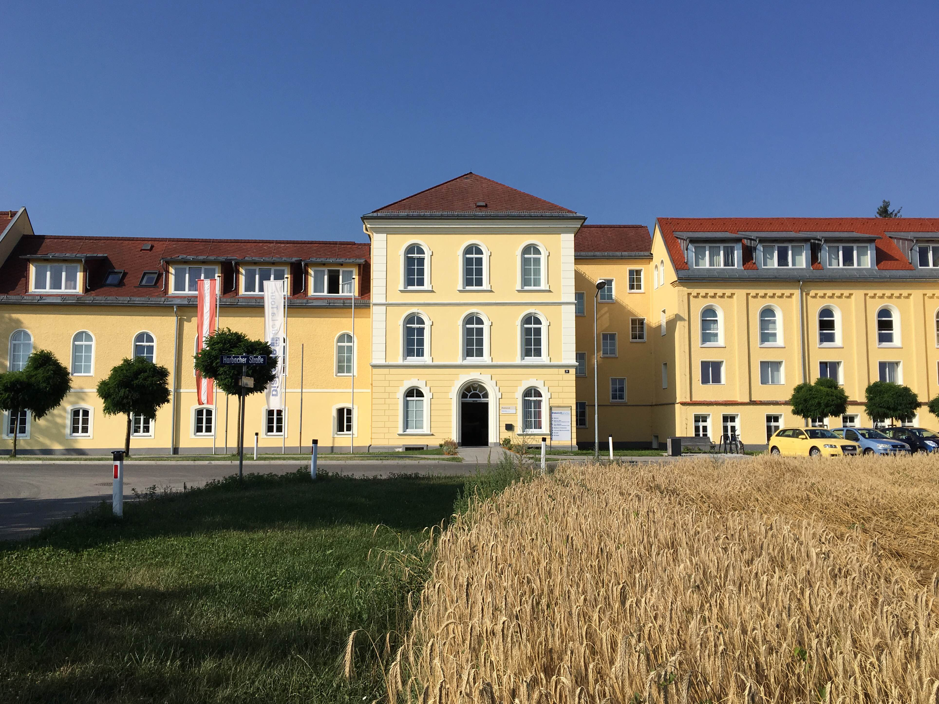 Frontansicht Schloss Harbach